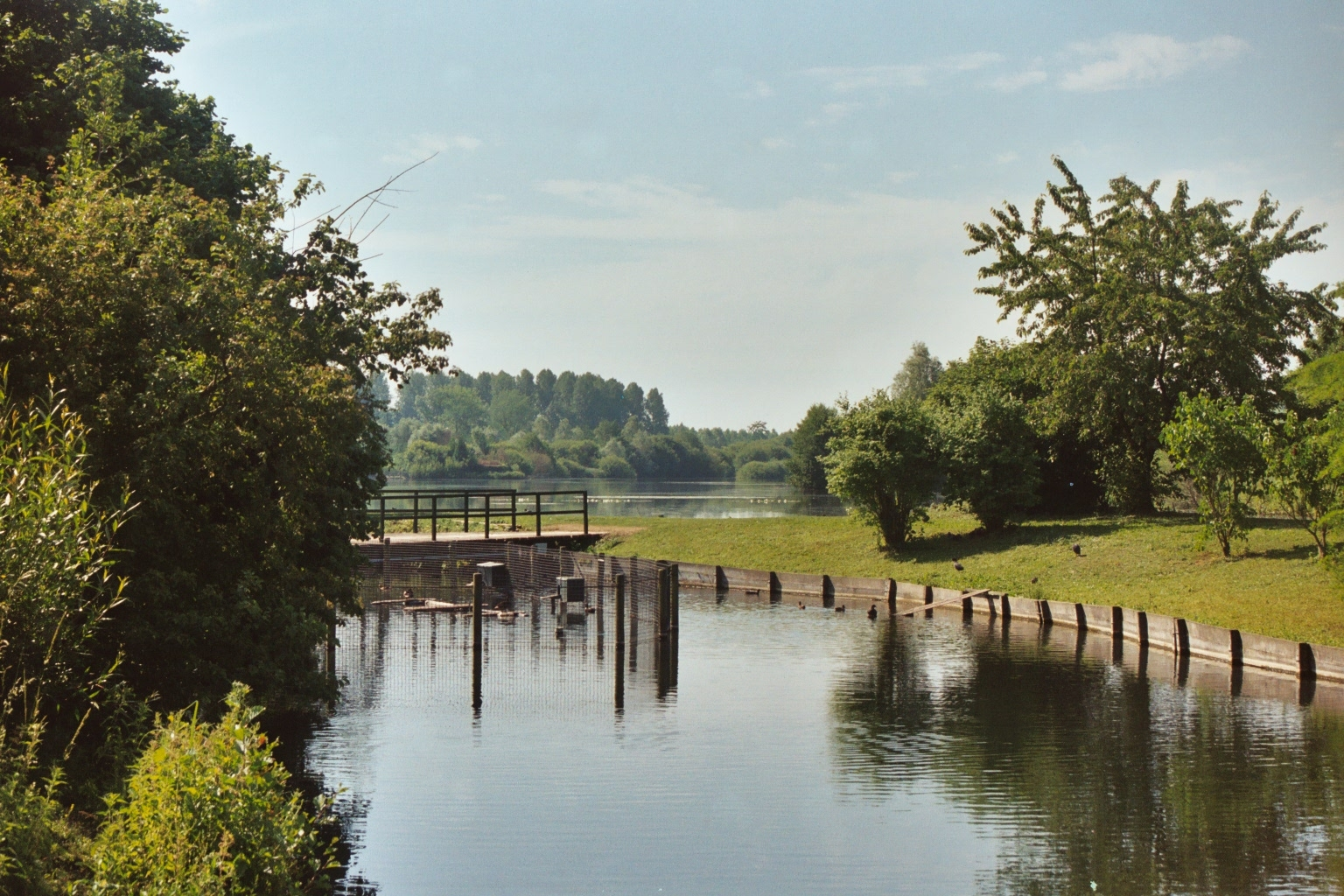 Vue des étangs de la Somme à Falvy